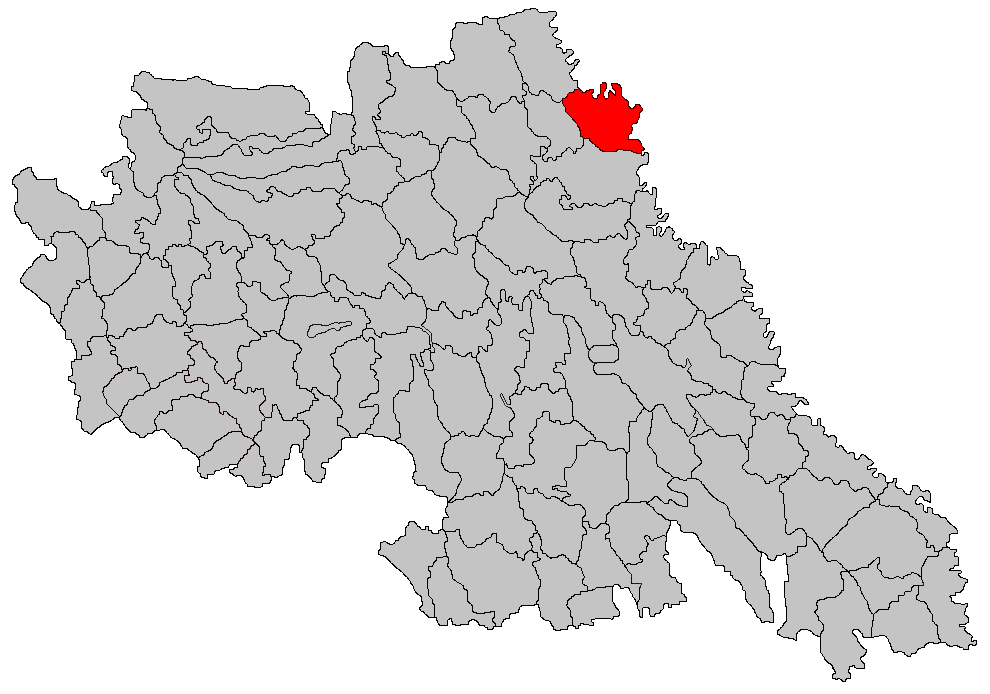 Categorie:Hărţi ale judeţului Iaşi